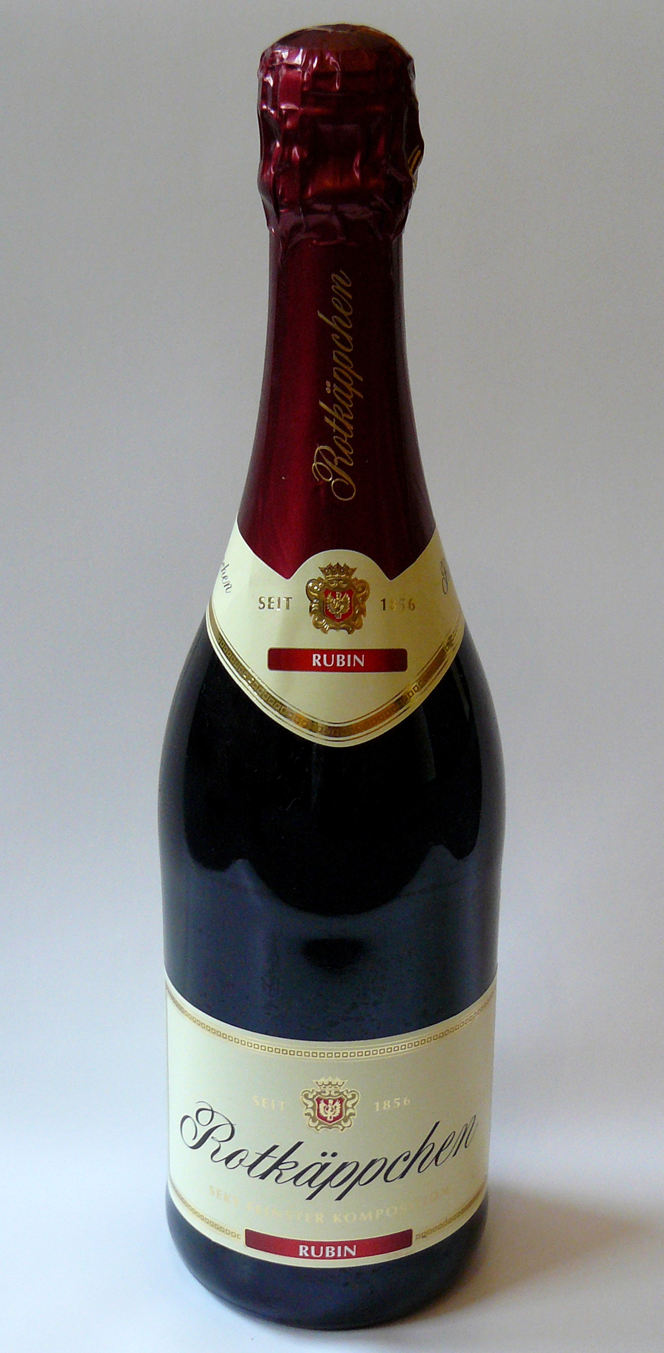 Rotkäppchen Sekt der Sektkellerei Rotkäppchen aus Freyburg (Unstrut). Hier die Standardausführung („Traditions-Sortiment“) mit der namensgebenden roten Kappe am Flaschenhals. Sorte: Cuvée Rubin.